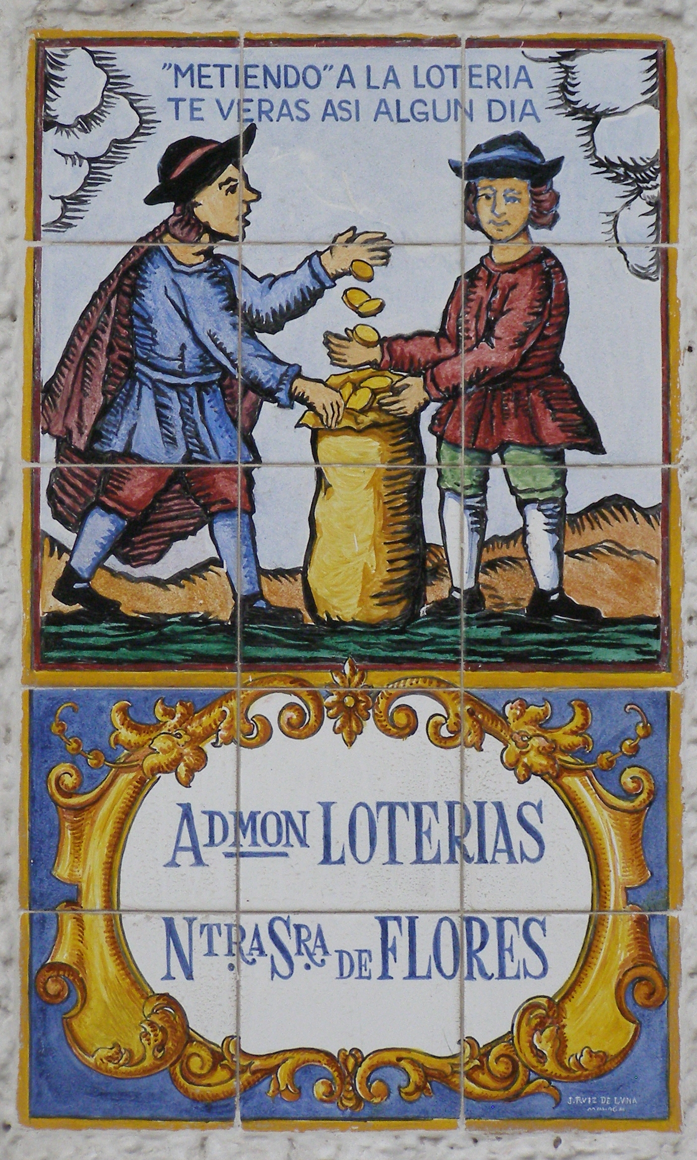 Álora - azulejo